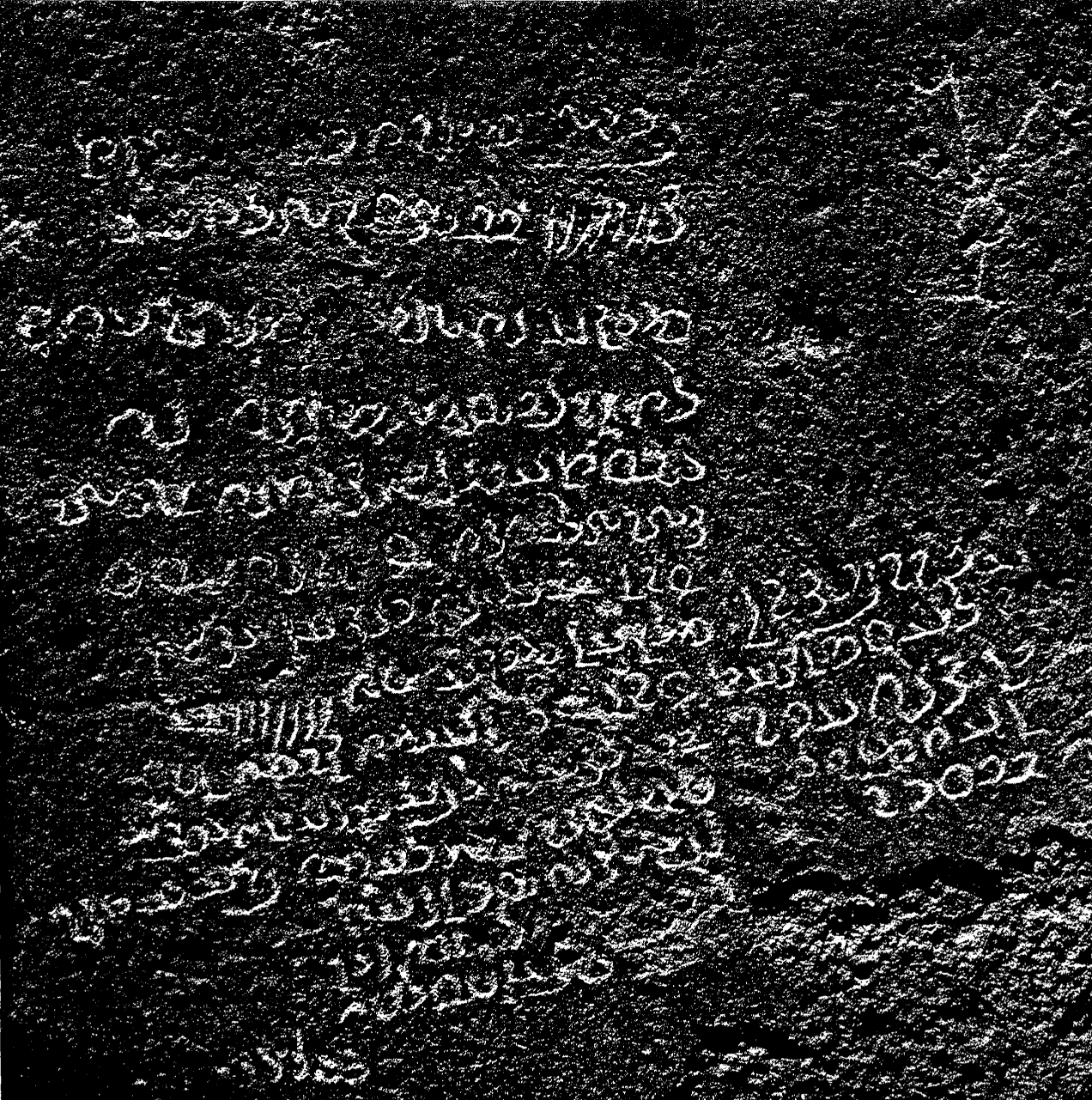 سنگ‌نبشته ساسانی مشکین‌شهر